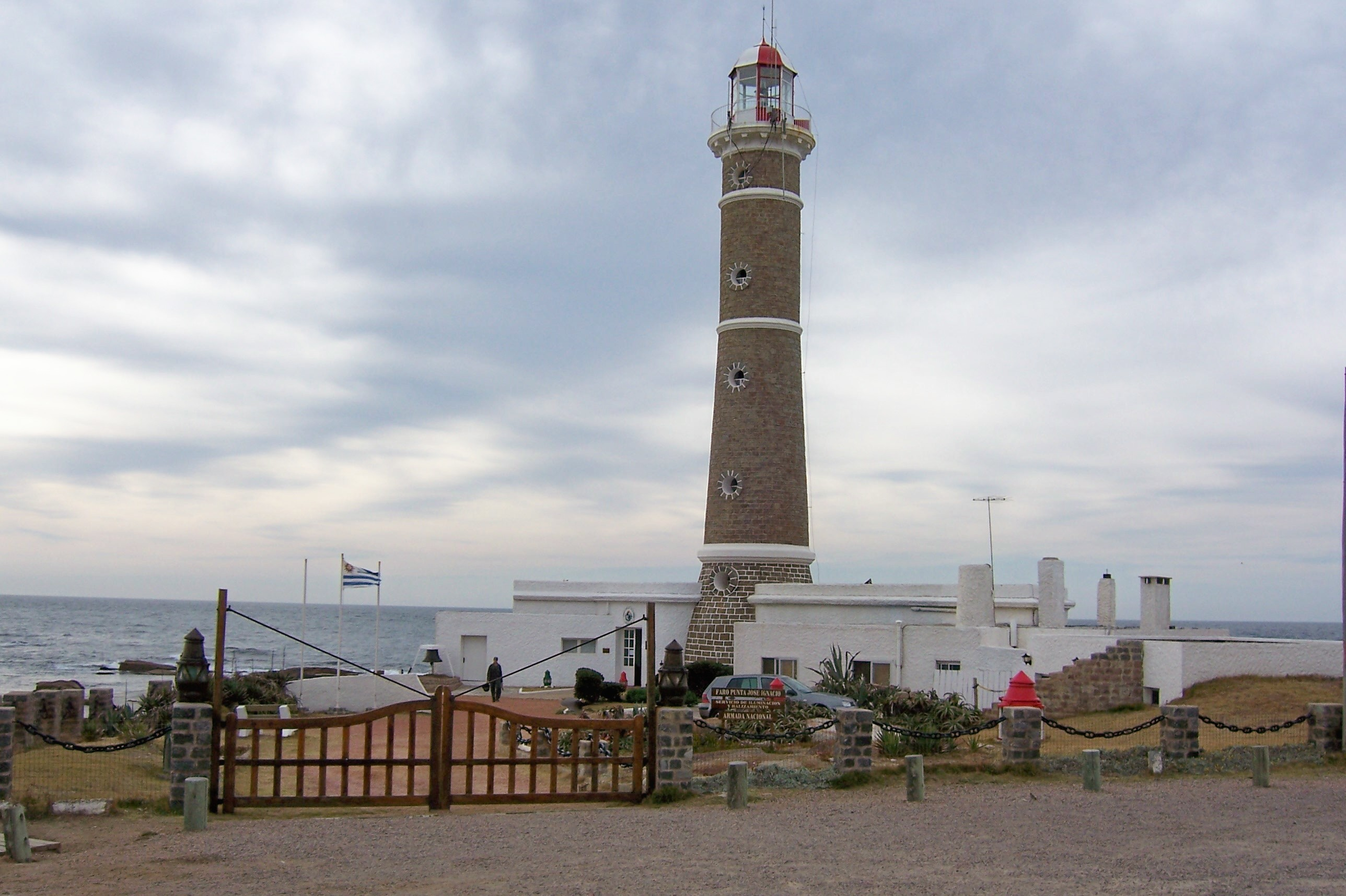 Faro de José Ignacio, Uruguay